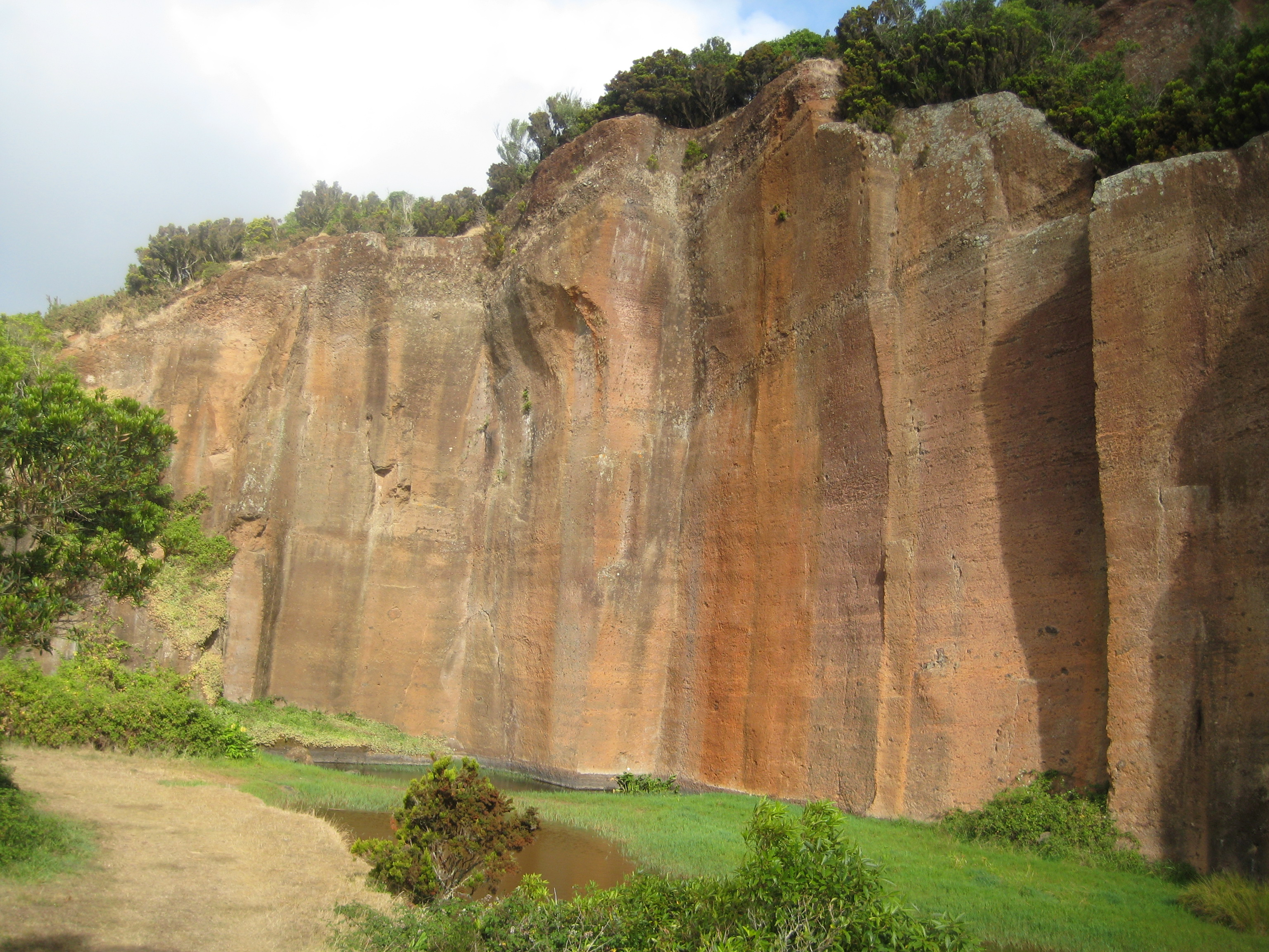 Pedreira - Trilho Santa Barbara